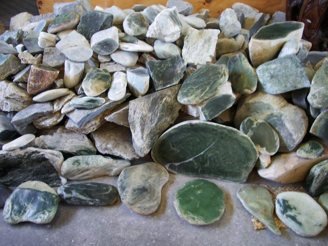 some samples of raw jade bouldersGreenstone in Hokitika, NZ